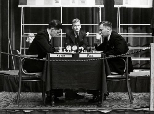 Schaken. De beslissing in het AVRO-Meestertournooi in het Amstelhotel Amsterdam valt op 27 november 1938, of liever gezegd de beslissing valt niet want de partij eindigt in remise en daarmee eindigen zij gelijk. Links: Paul Keres en de Amerikaan Reuben Fine [1914-1993].